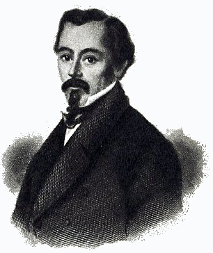 Portrait des Schriftstellers Alfred Meißner.